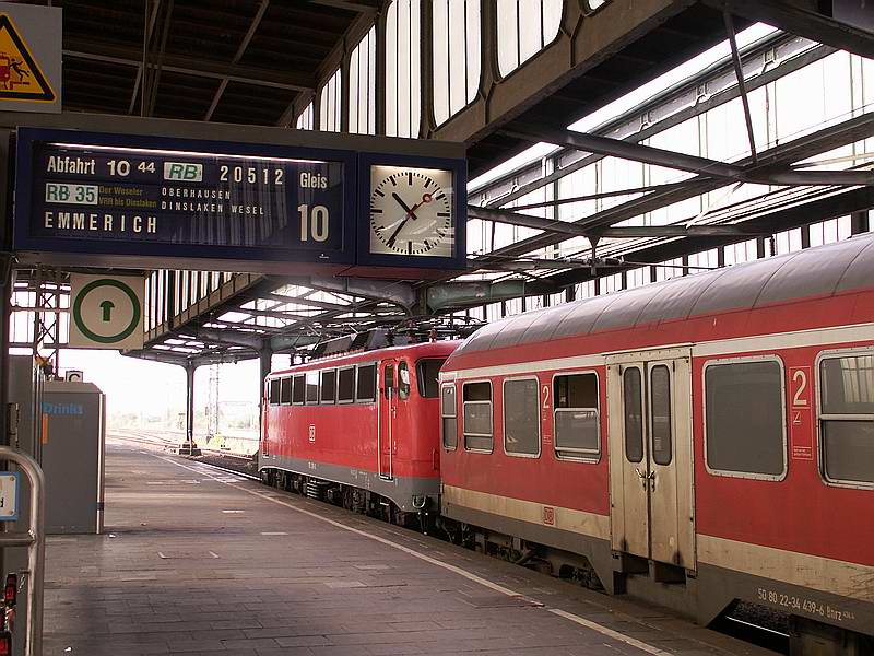 Bahnhof in Duisburg